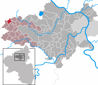 Siebenbach in Rhineland-Palatinate - district Mayen-Koblenz